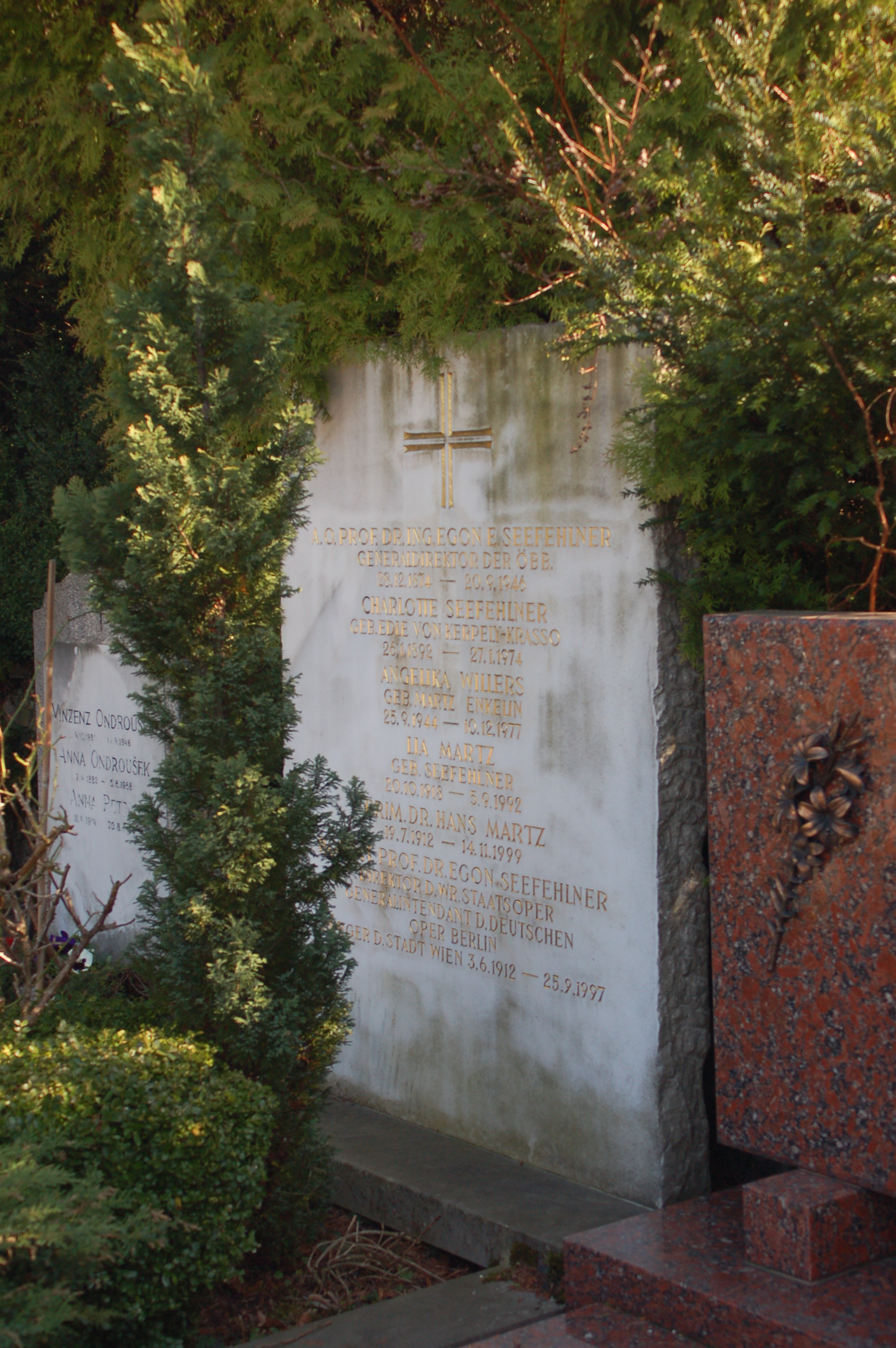 Neustifter Friedhof, Grabstätte von Egon Seefehlner (Ehrengrab der Stadt Wien)